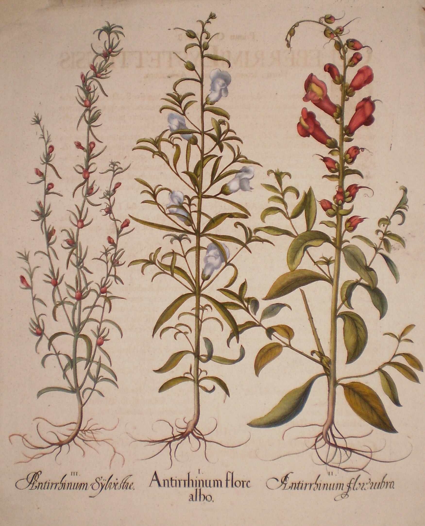 Disegno delle specie Antirrhinum sylvestre, Antirrhinum flore albo e Antirrhinum floumbro provenienti dell'edizione del 1613 a Norimberga del Celeberrimi Eystettensis. Dall'archivio della Libreria antiquaria Bourlot di Marco Birocco, Torino